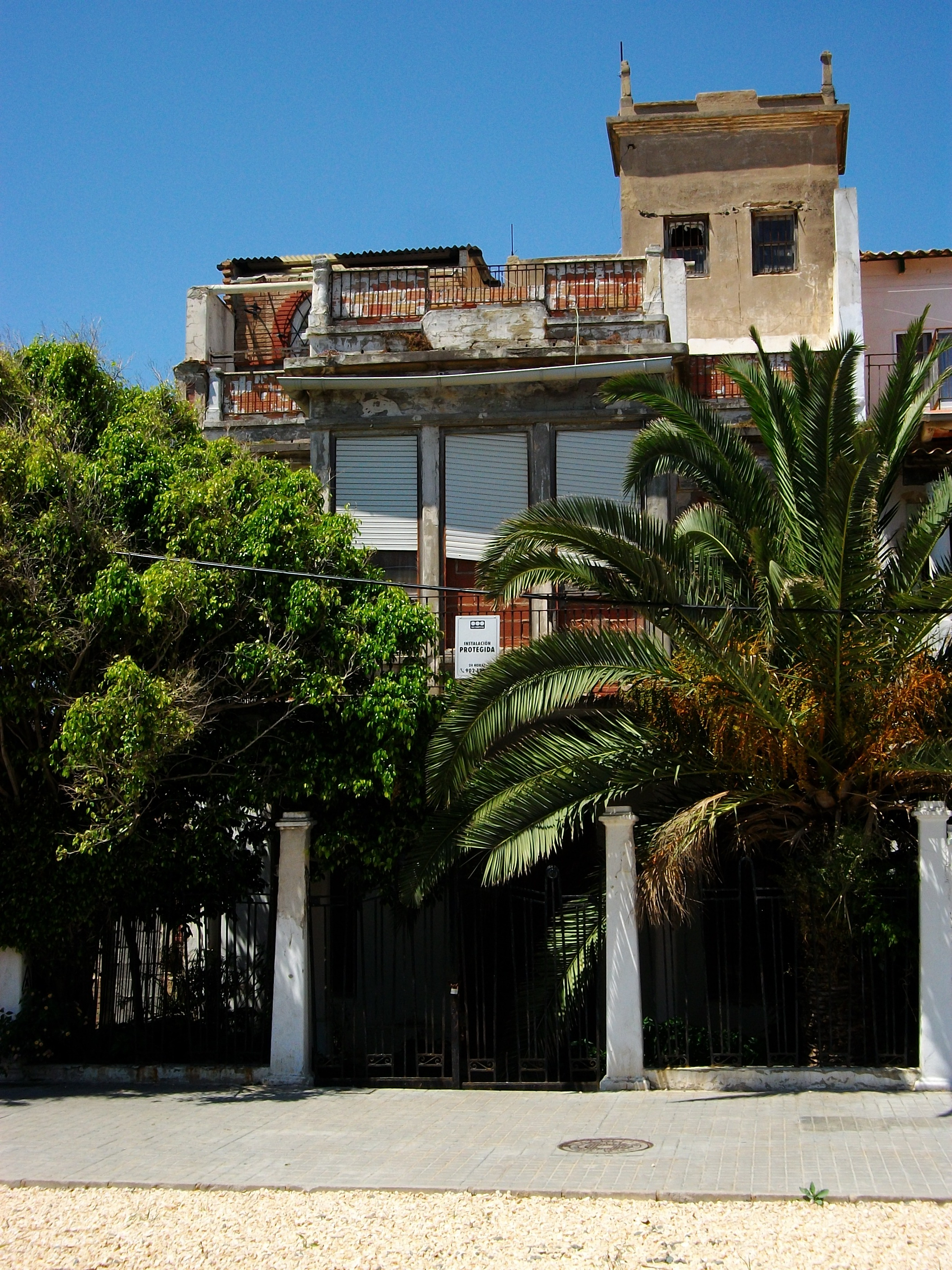 Casa Ribes, platja de les Arenes o del Cabanyal.